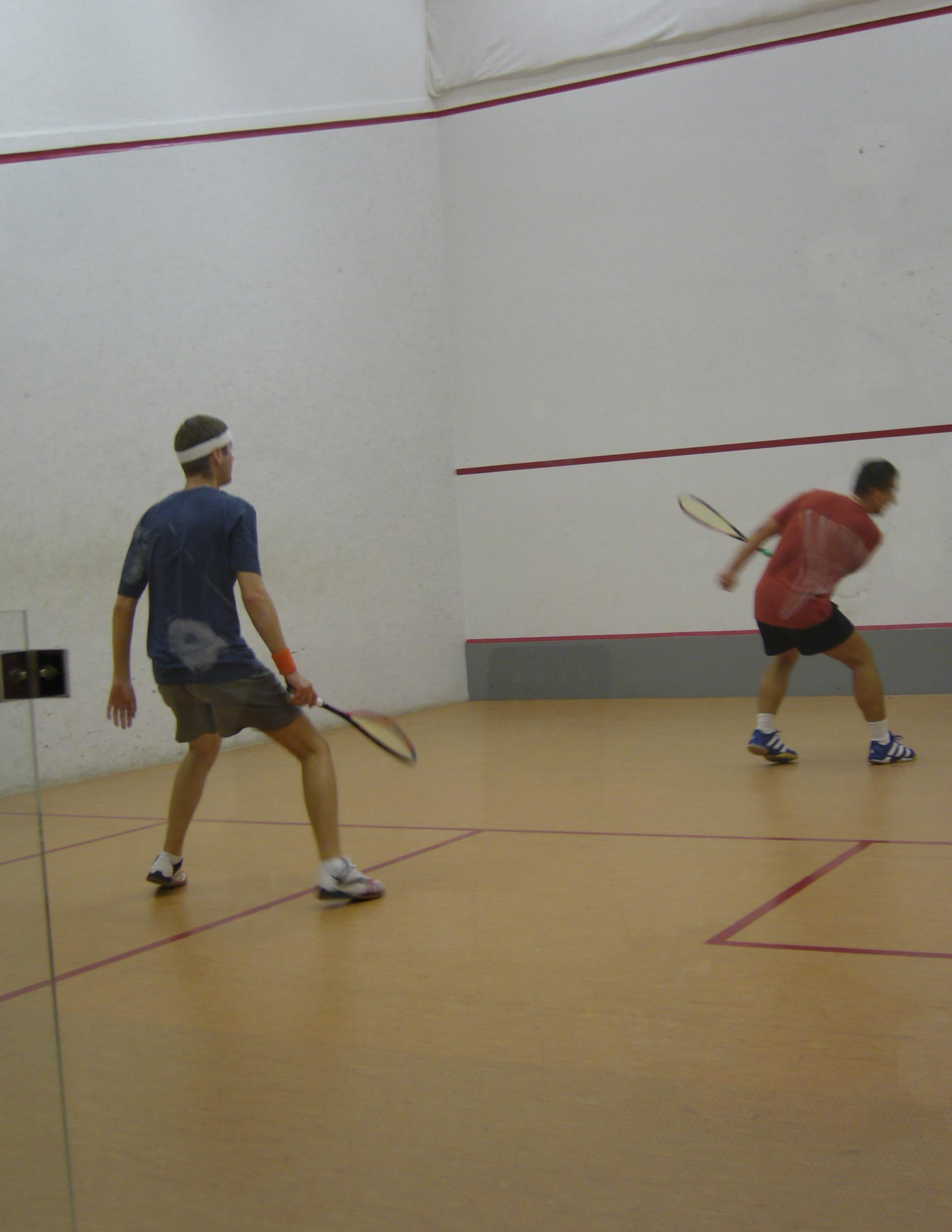 Fallabdajáték